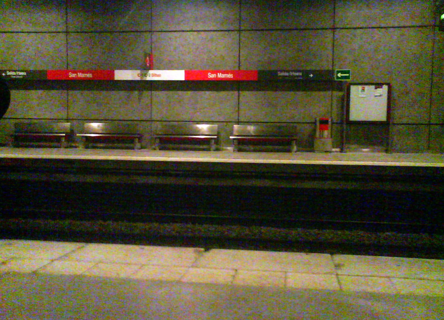 San Mames Renfe Aldirikoen geltokia